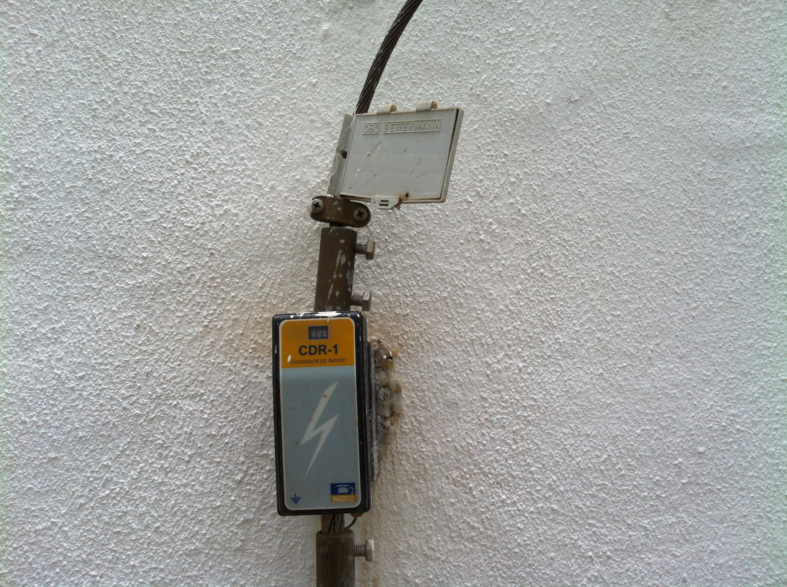 Museu Romàntic Can Papiol. Maig 2014